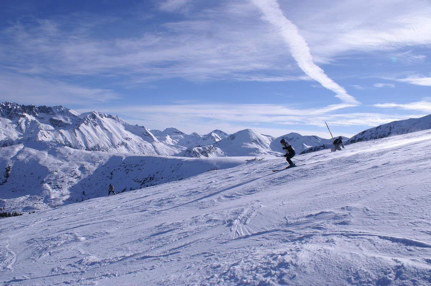 Imagine cu partia Tomba din statiunea Bansko, Bulgaria